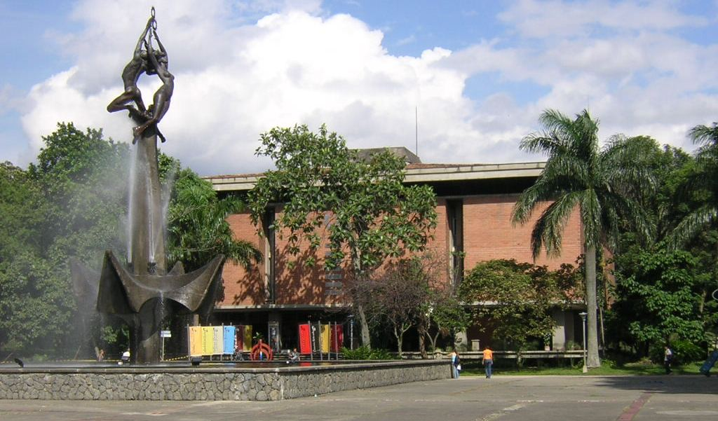 Museo Universitario, Universidad de Antioquia, Medellín, Colombia (esta foto la tome yo, y la libero al dominio público)